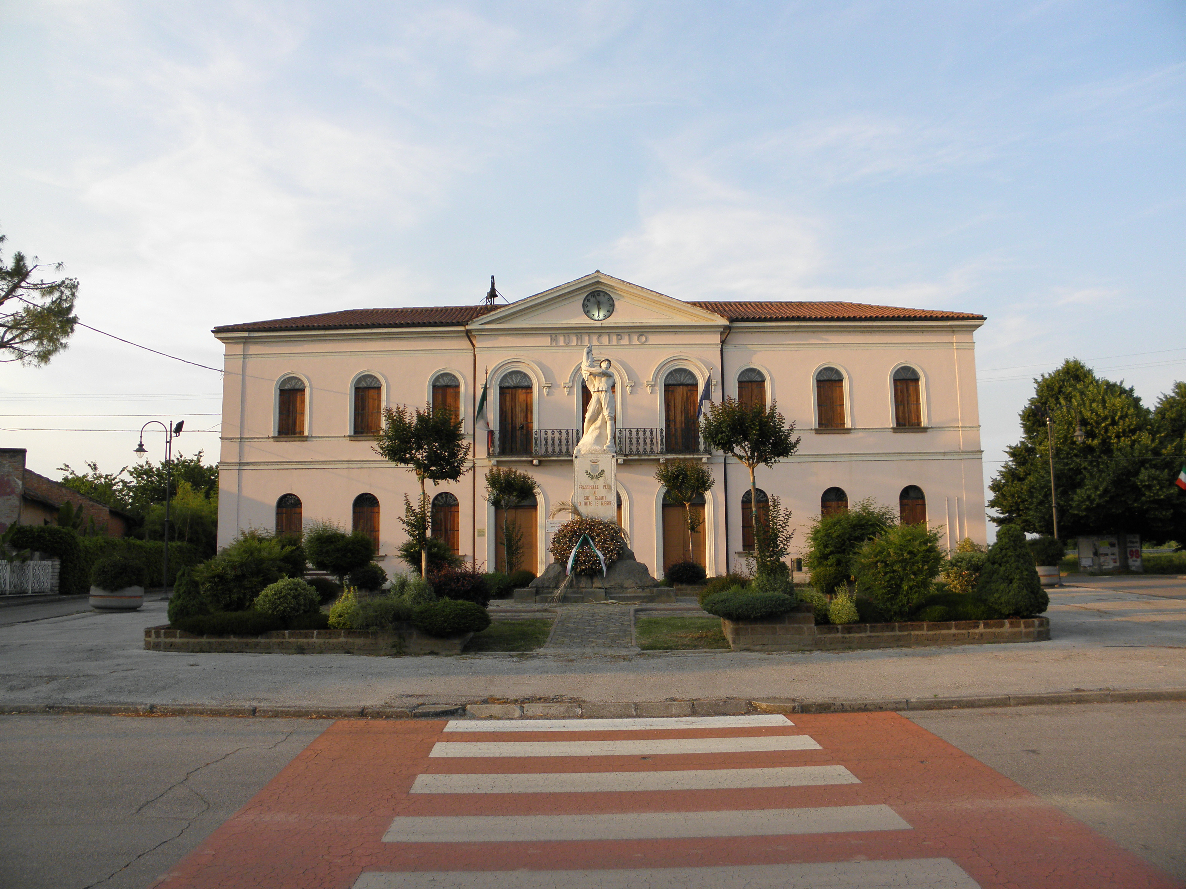 Frassinelle Polesine: palazzo municipale.